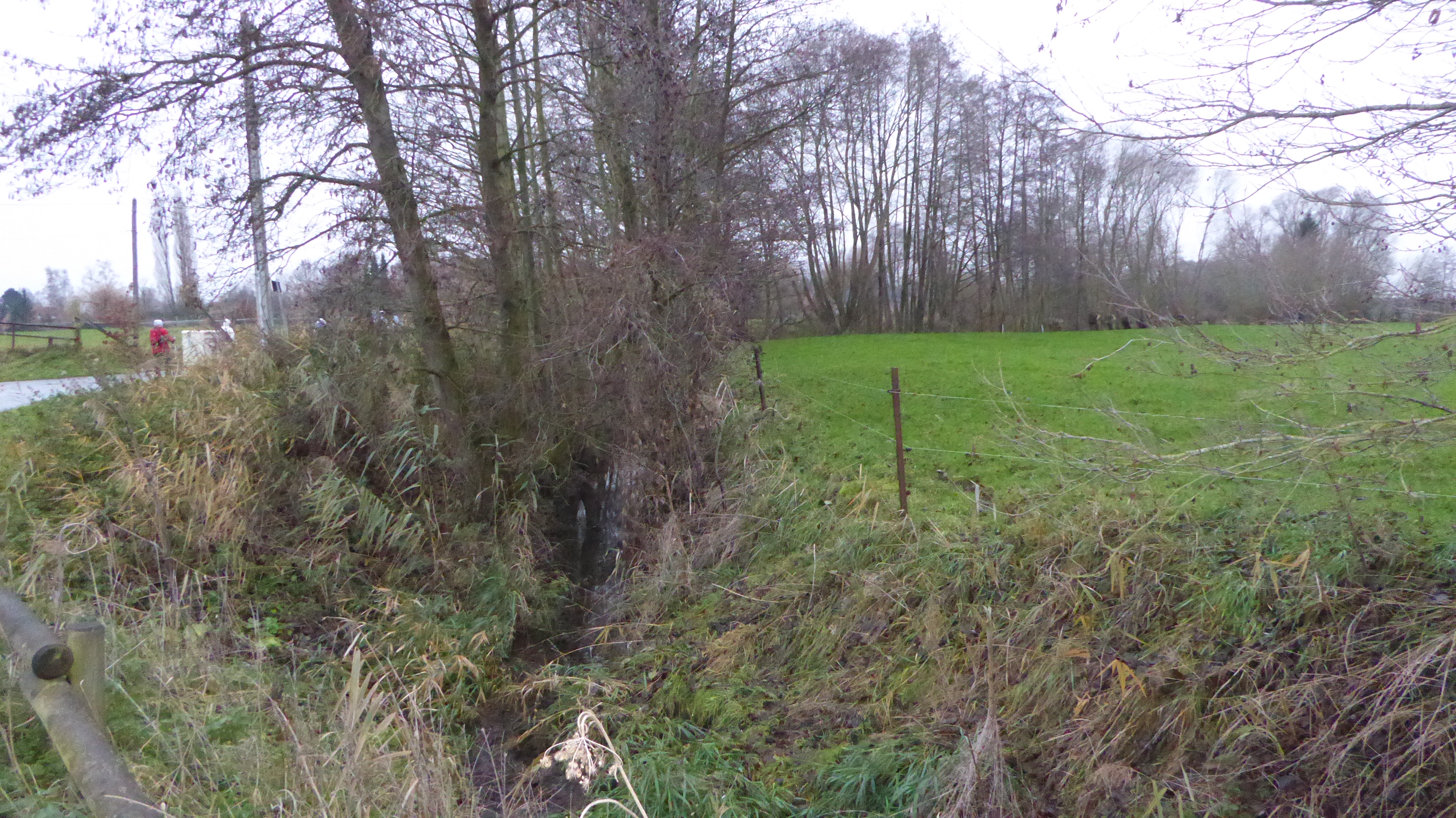 Nomain . Sur la randonnée pédestre du circuit des voyettes